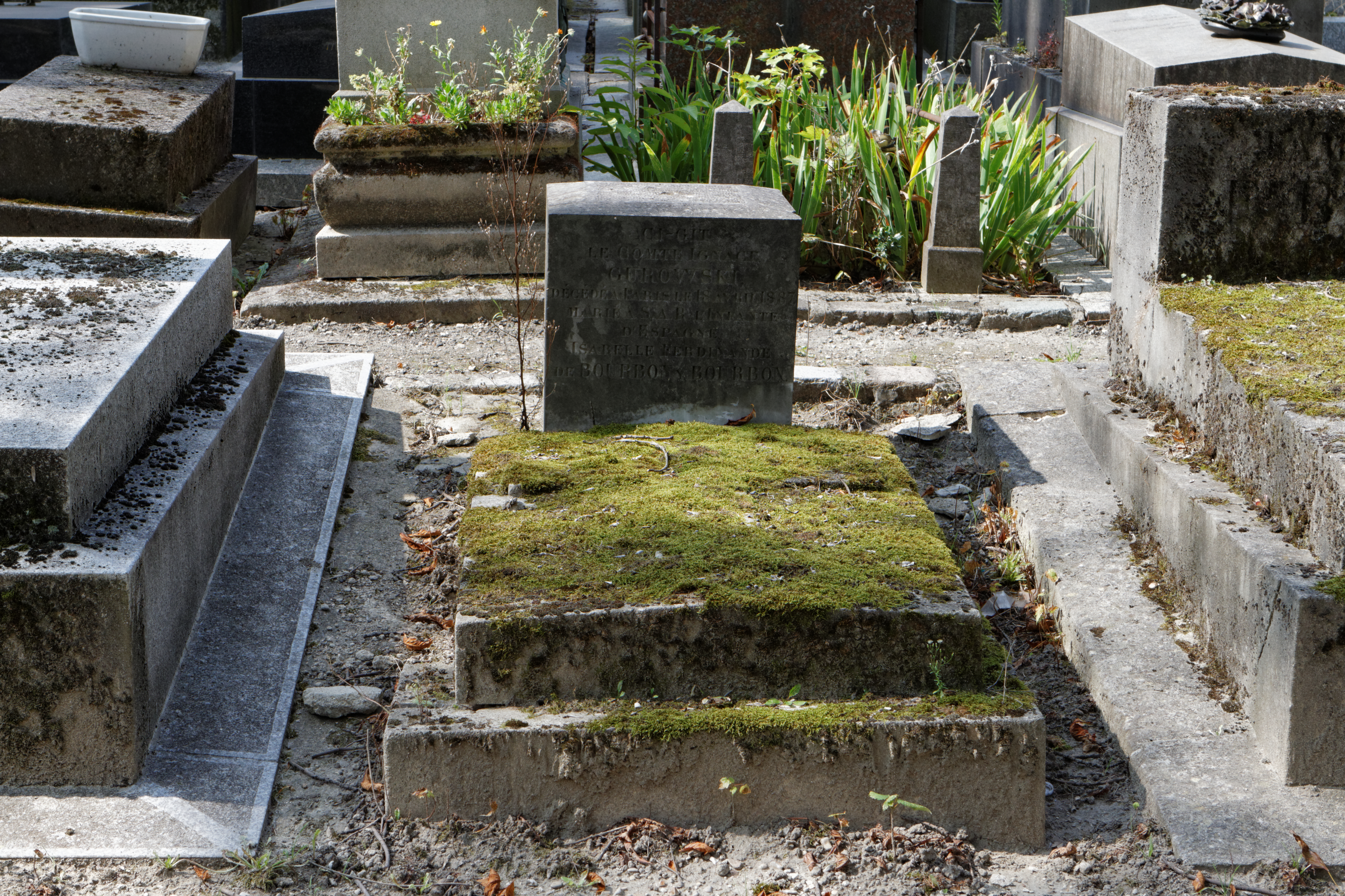 Sépulture d'Ignace Gurowski (1812-1887), aristocrate polonais marié à l'infante Isabelle Ferdinande de Bourbon, nièce du roi Ferdinand VII.